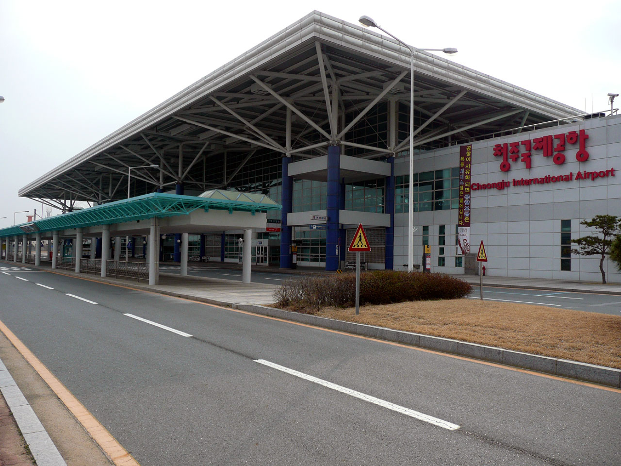 清州国際空港外観